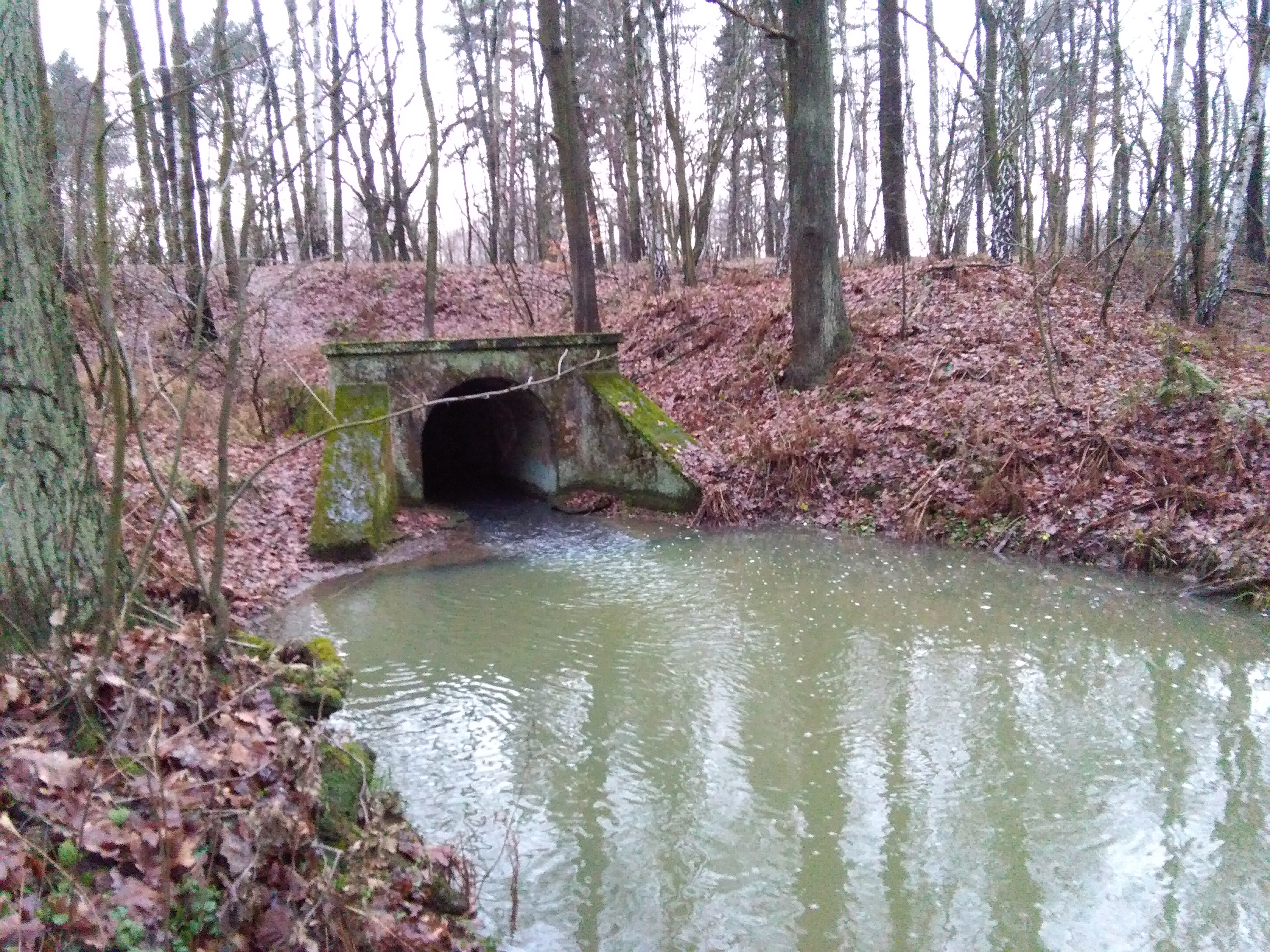 Katowice Podlesie - struga Bielawka w lesie Gniotek.